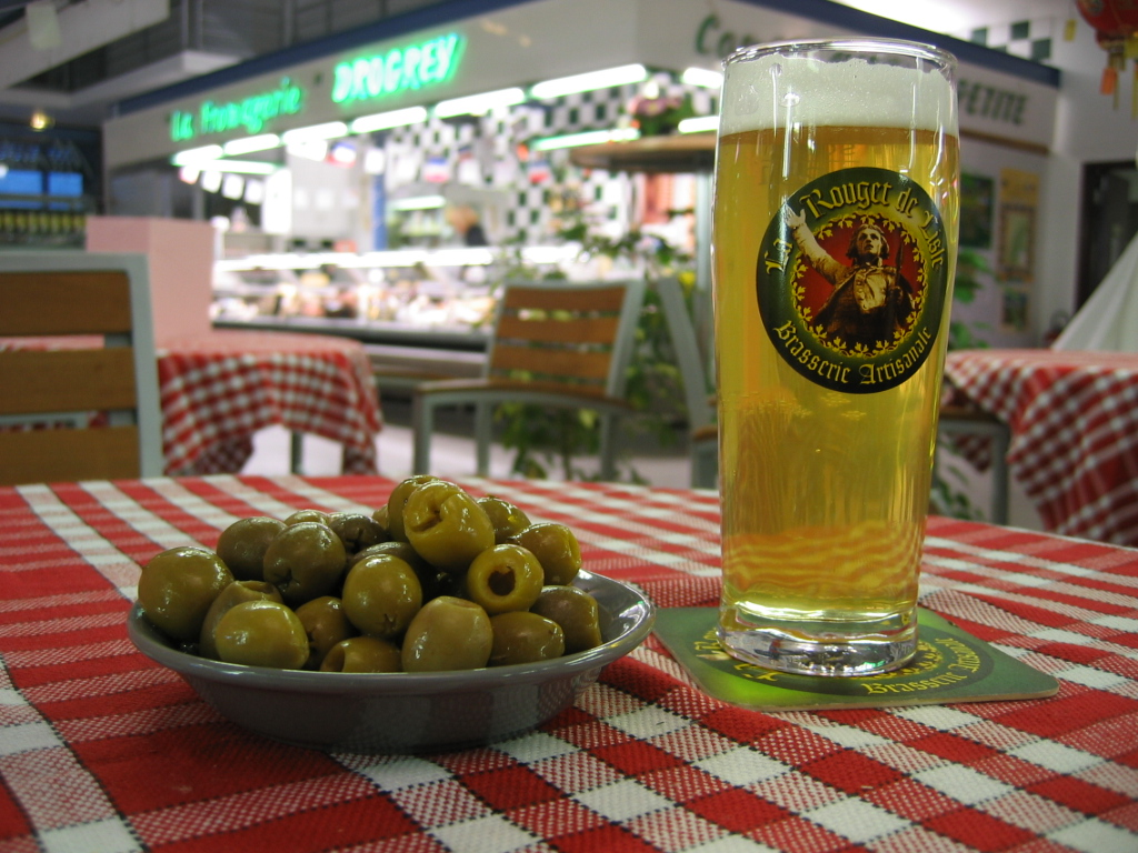 Bière pression Rouget de Lisle